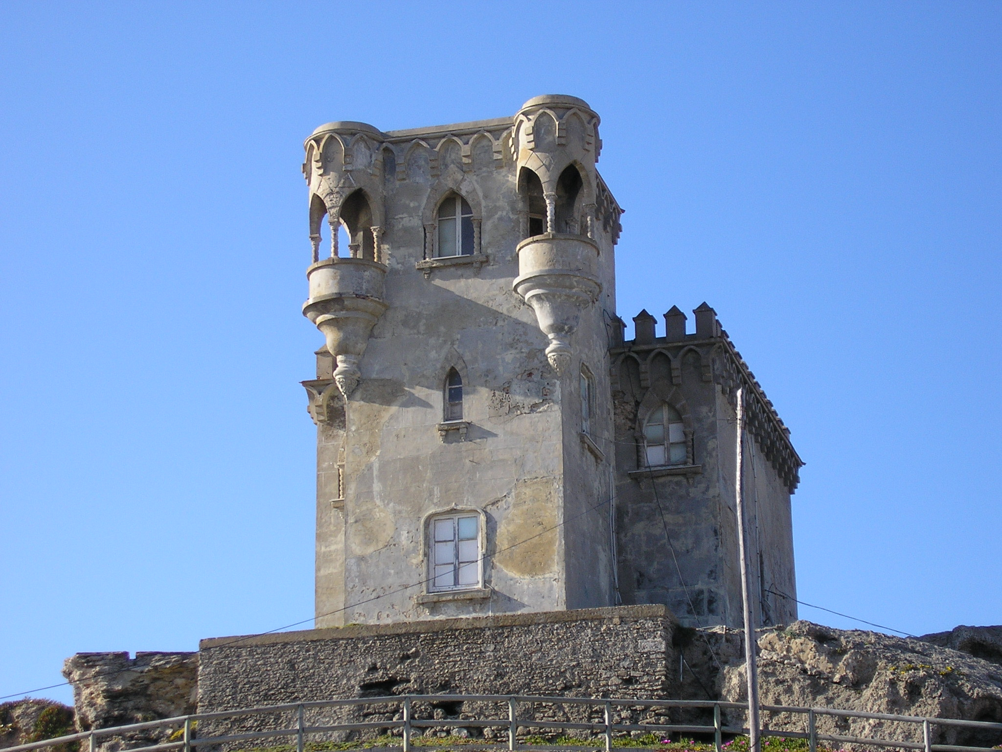 Castillo de Santa Catalina en Tarifa, Andalucía, España